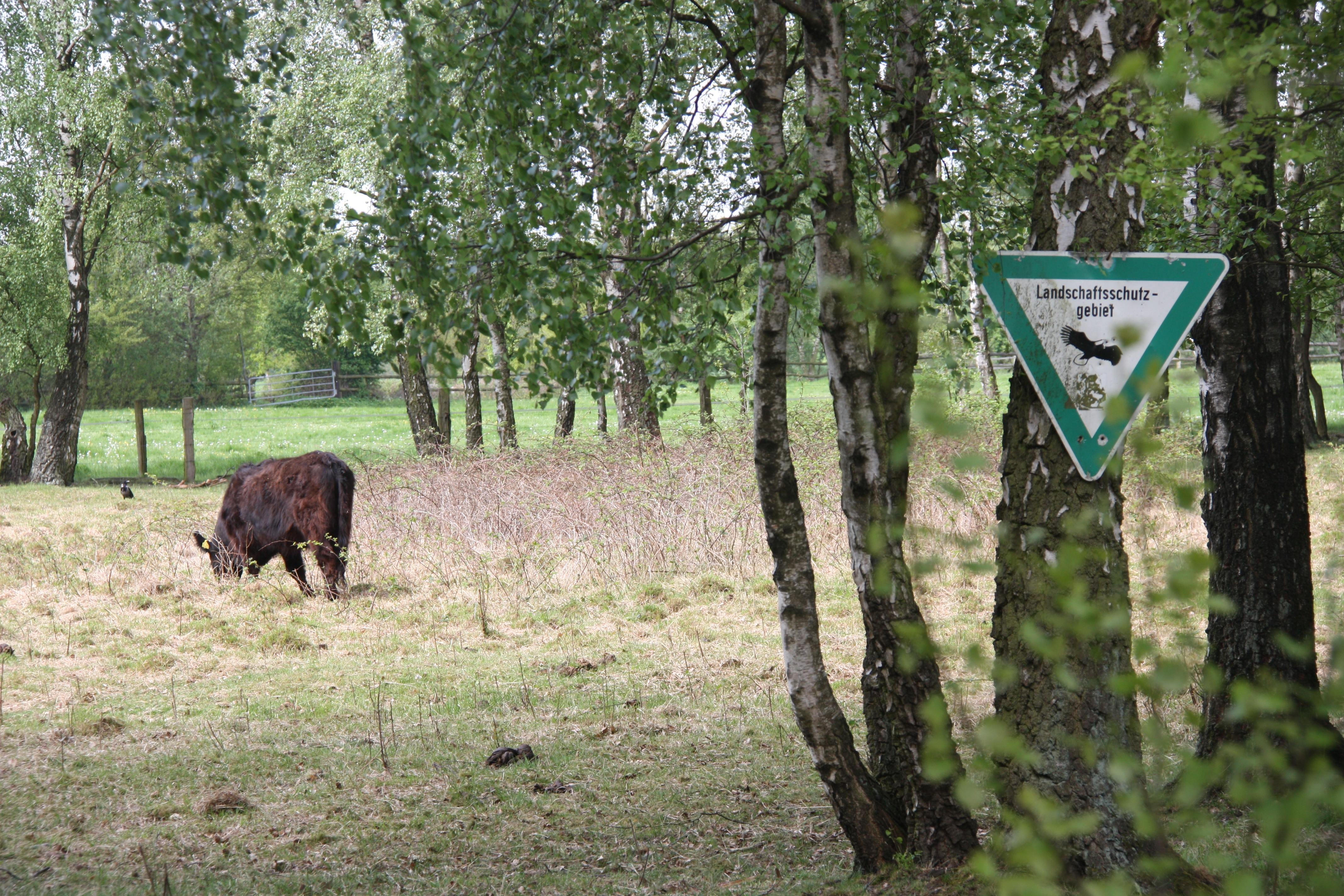 Wiesen und Weidevieh in der Nähe vom Naturschutzgebiet „Stapelfelder Moor“, Schild Landschaftsschutzgebiet (LSG „Stapelfeld“ in Stapelfeld, Kreis Stormarn, Schleswig-Holstein)